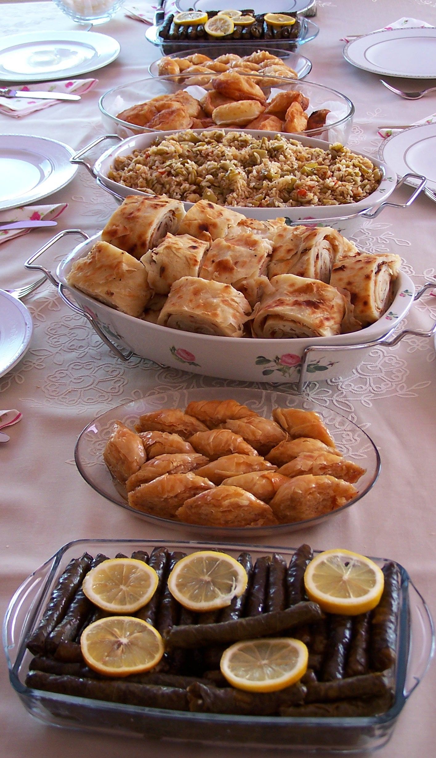 Dolma, Baklava, Gözleme, Pilav, Fincan-böreği, Sarma (Grape vine leaves), Borek